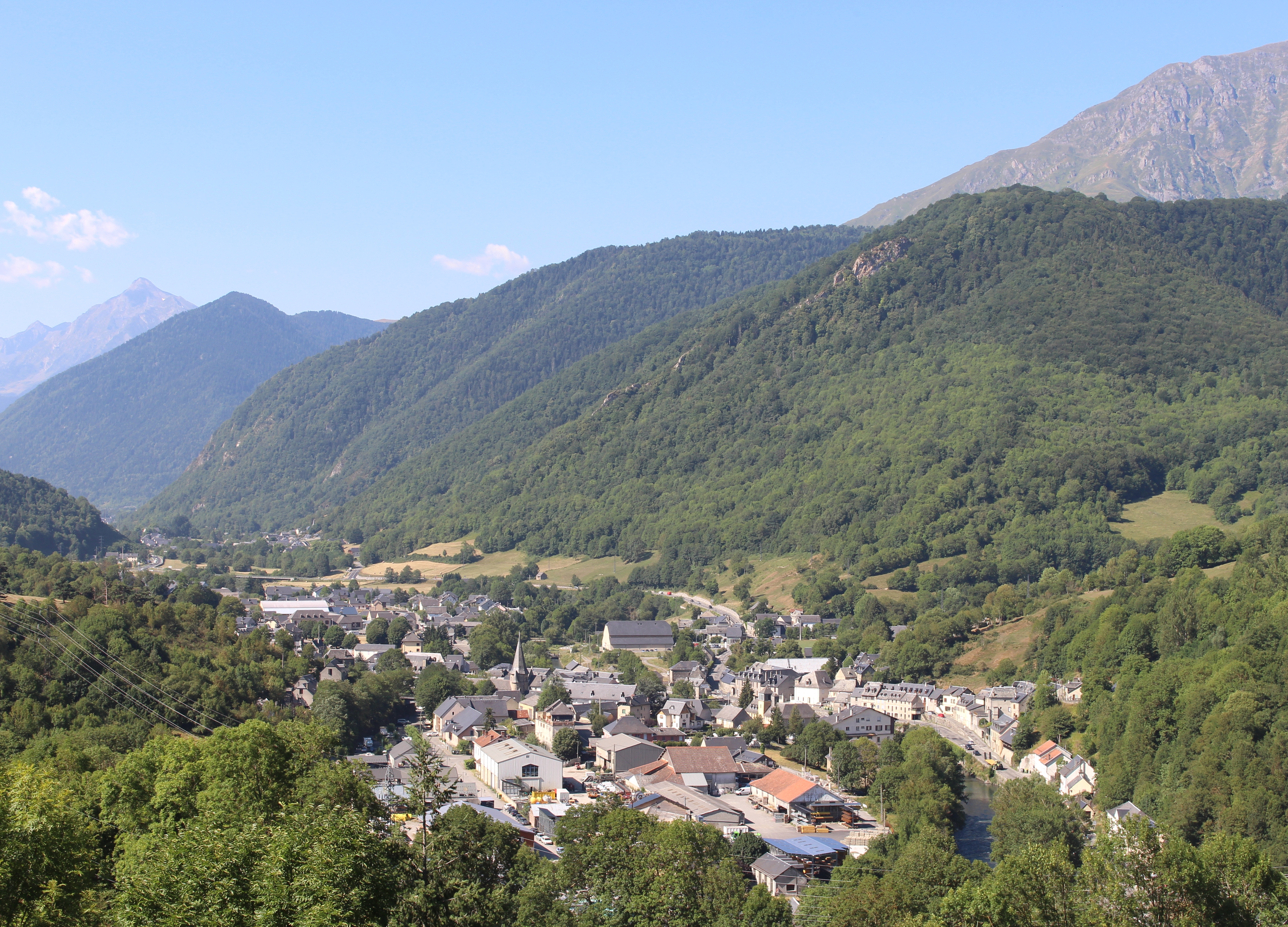 Arreau (Hautes-Pyrénées)